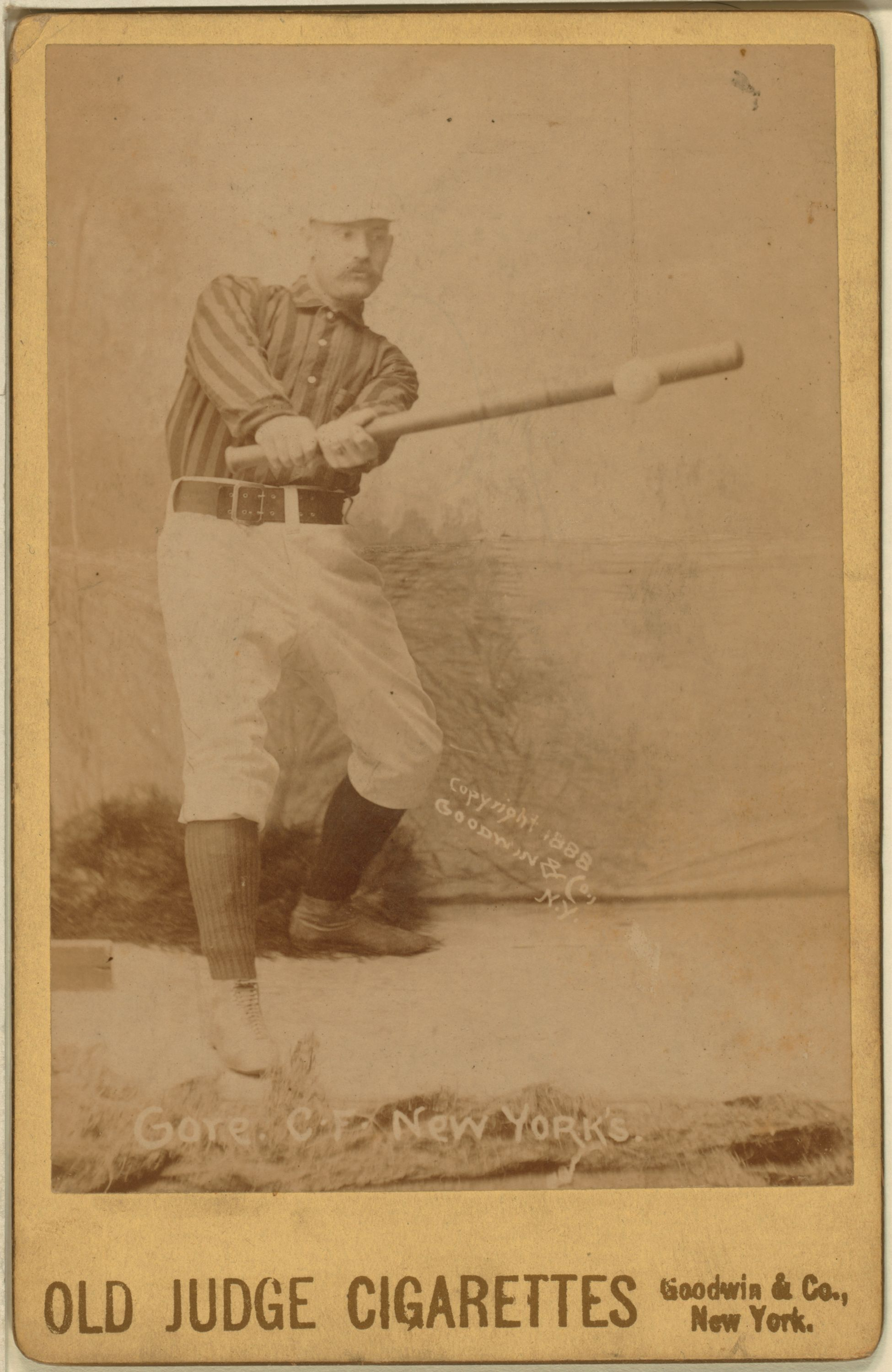 George Gore